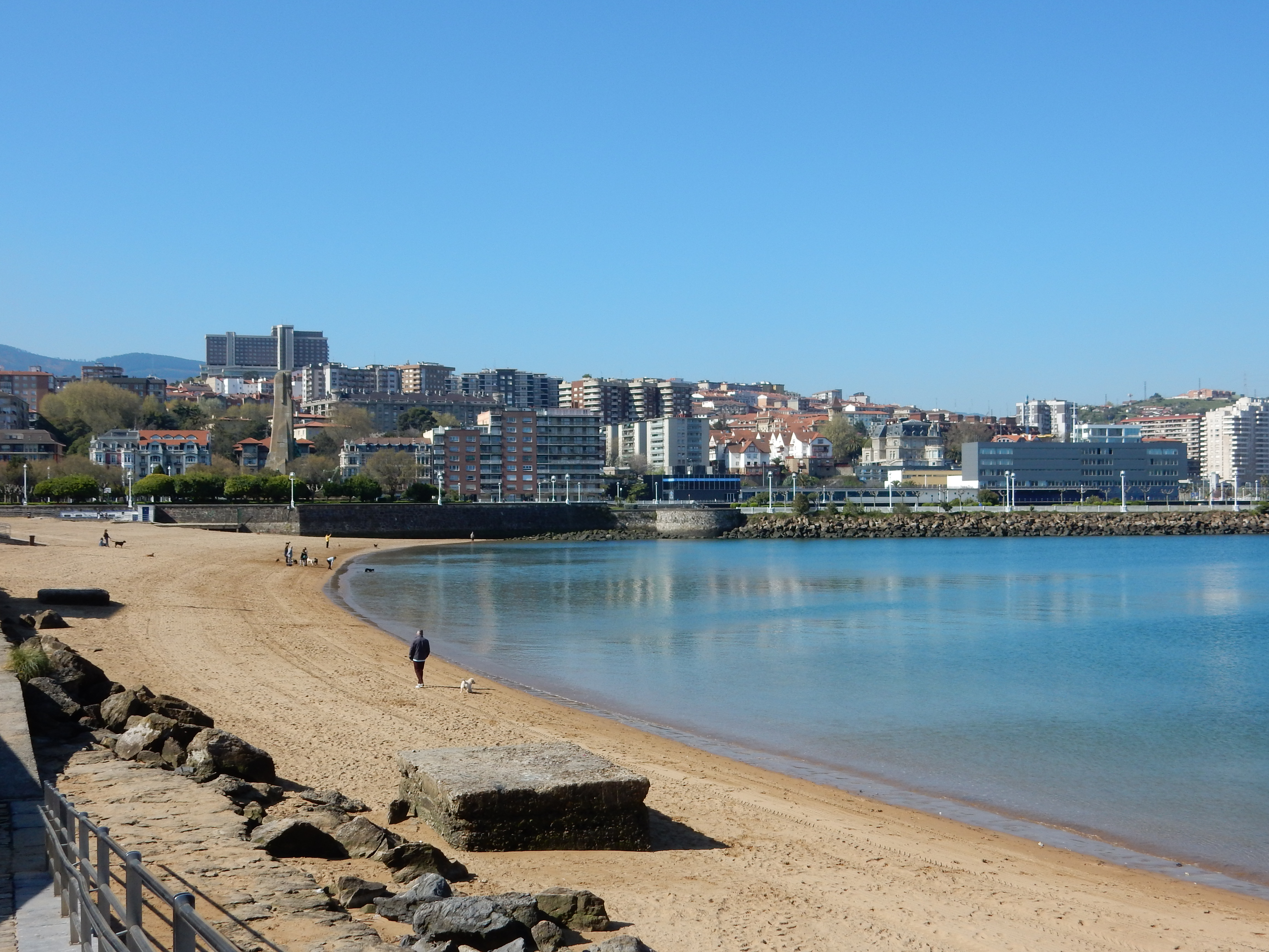 Veduta spiaggia Las Arenas